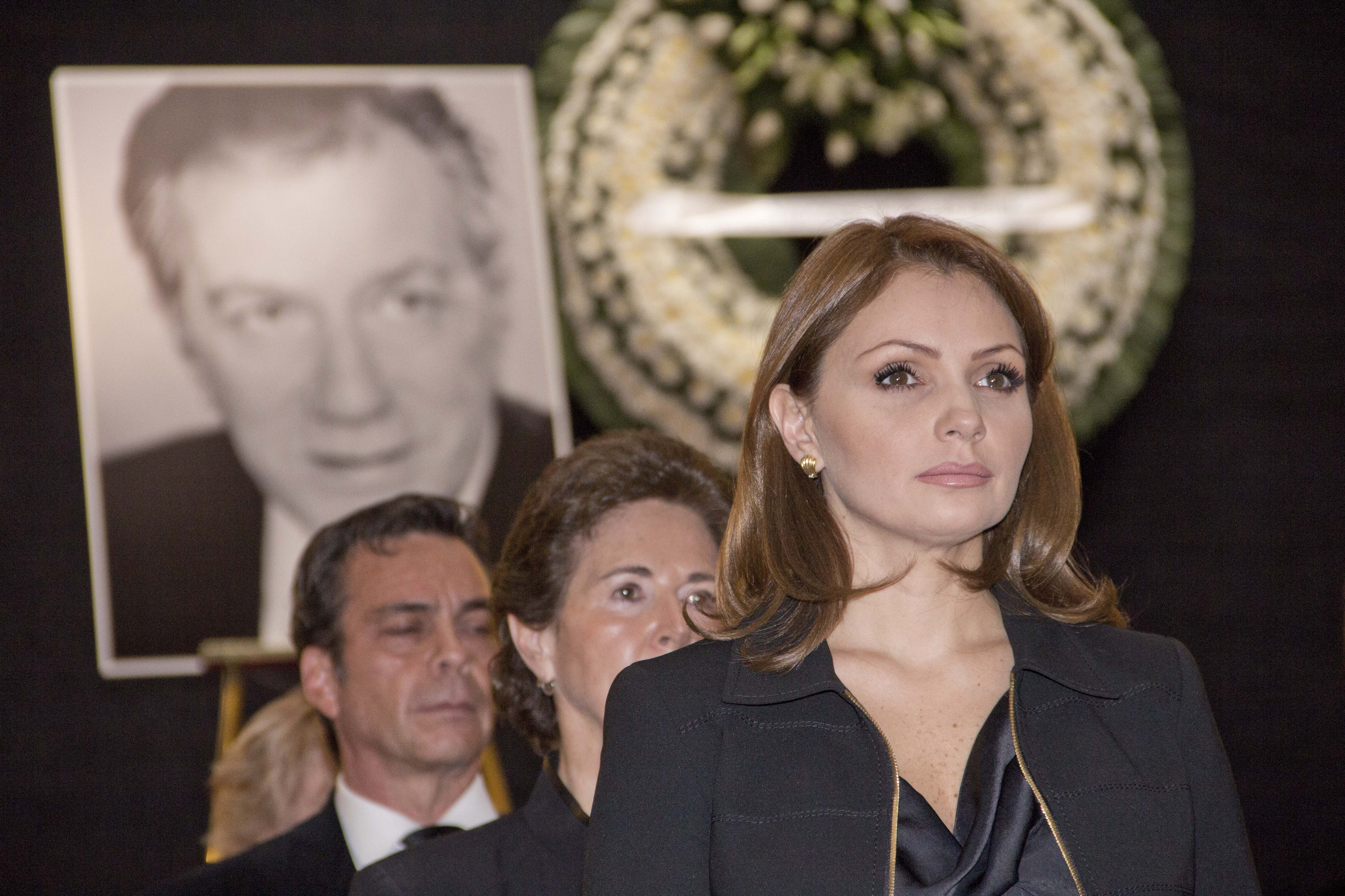 Guardia de Honor a Joaquín Cordero. Palacio de Bellas Artes. 21 febrero 2013